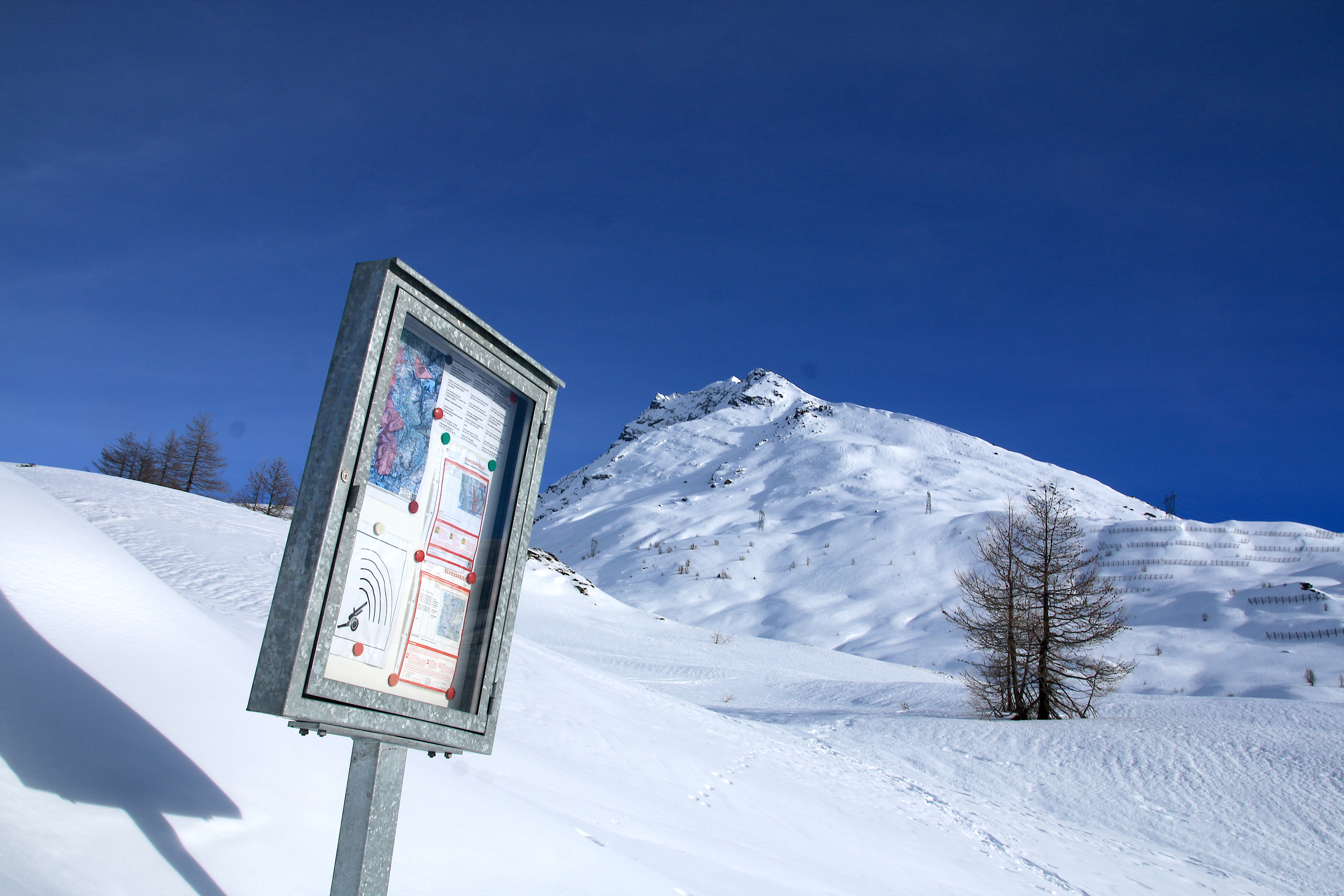 Schiessanzeige Simplon (2018)